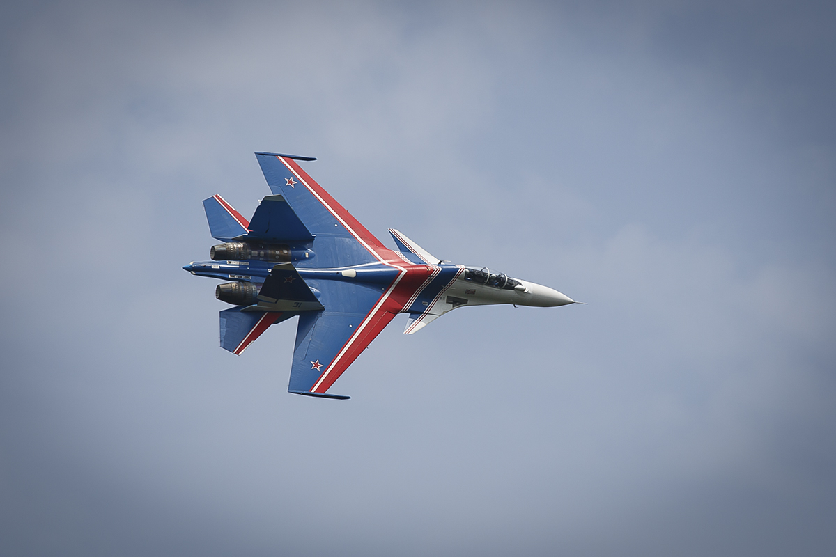 Выступление пилотажной группы «Русские Витязи» из пяти самолётов Су-30СМ на акции «Служба по контракту — твой выбор» в Белгороде.